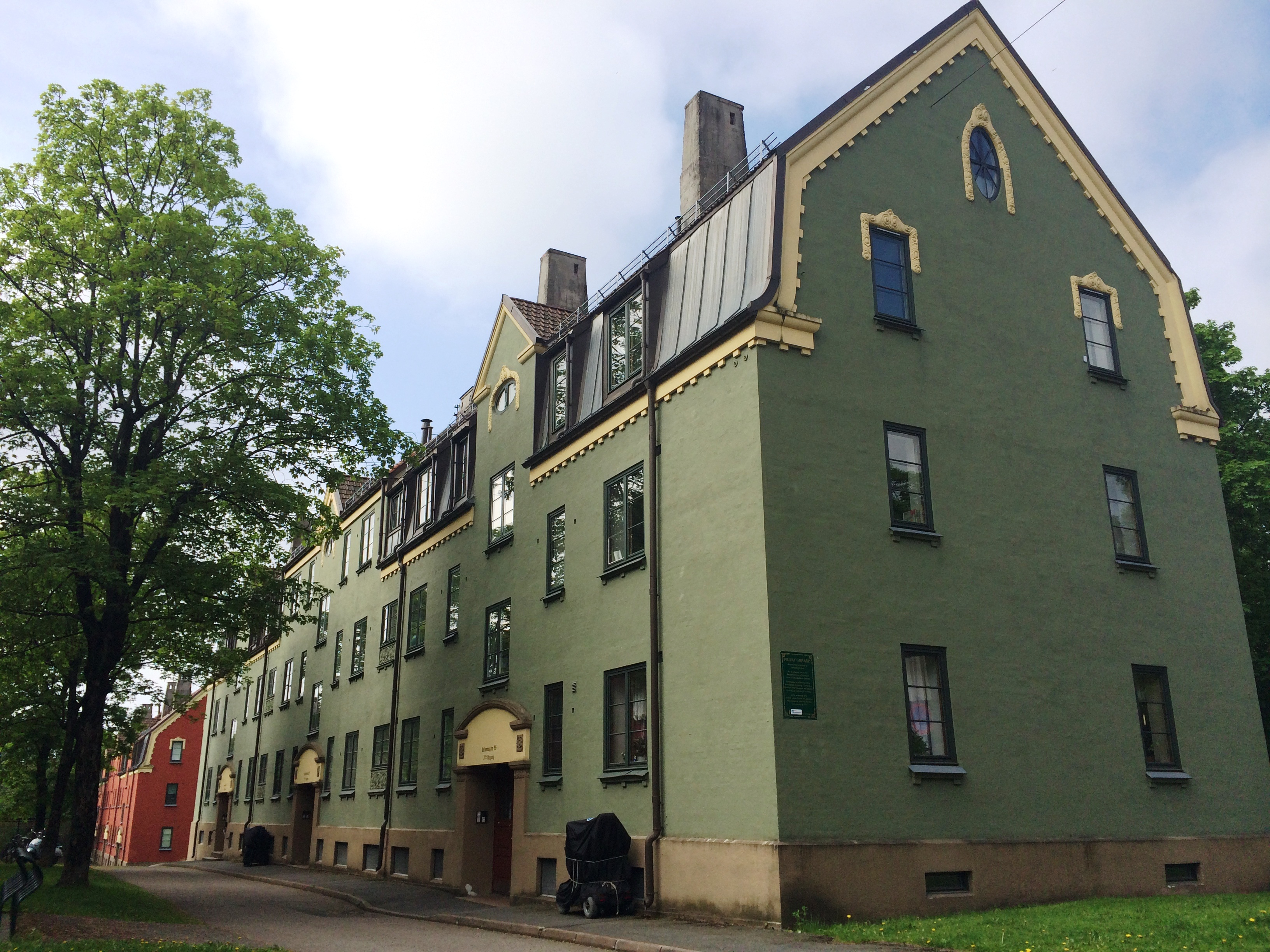 Rivertz-komplekset er et strøk med tidlig 1900-talls jugend bygårder på vestre Sagene i Oslo.